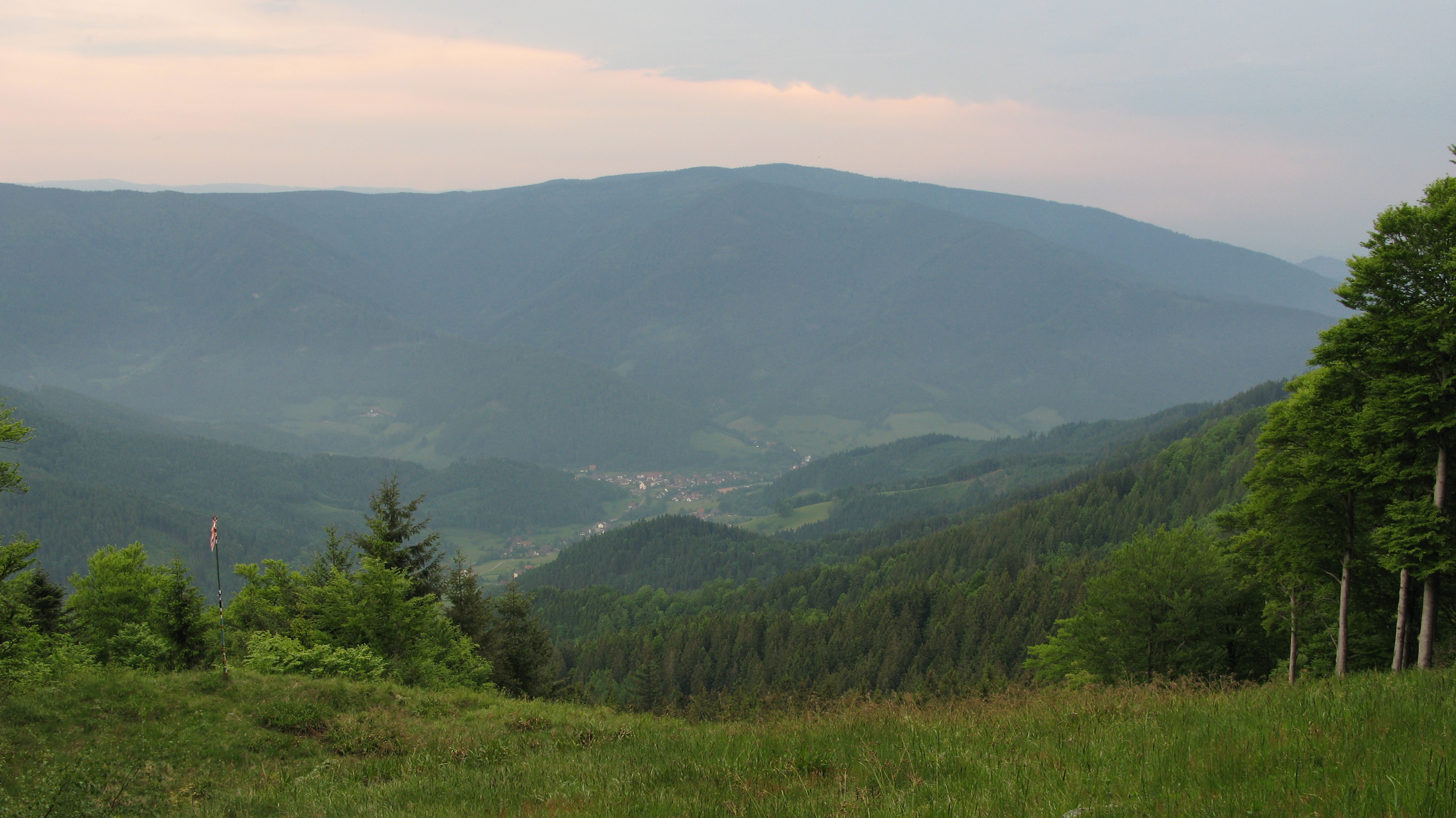 Blick vom Tafelbühl auf Simonswald am Zweitälersteig im Simonswäldertal im Schwarzwald